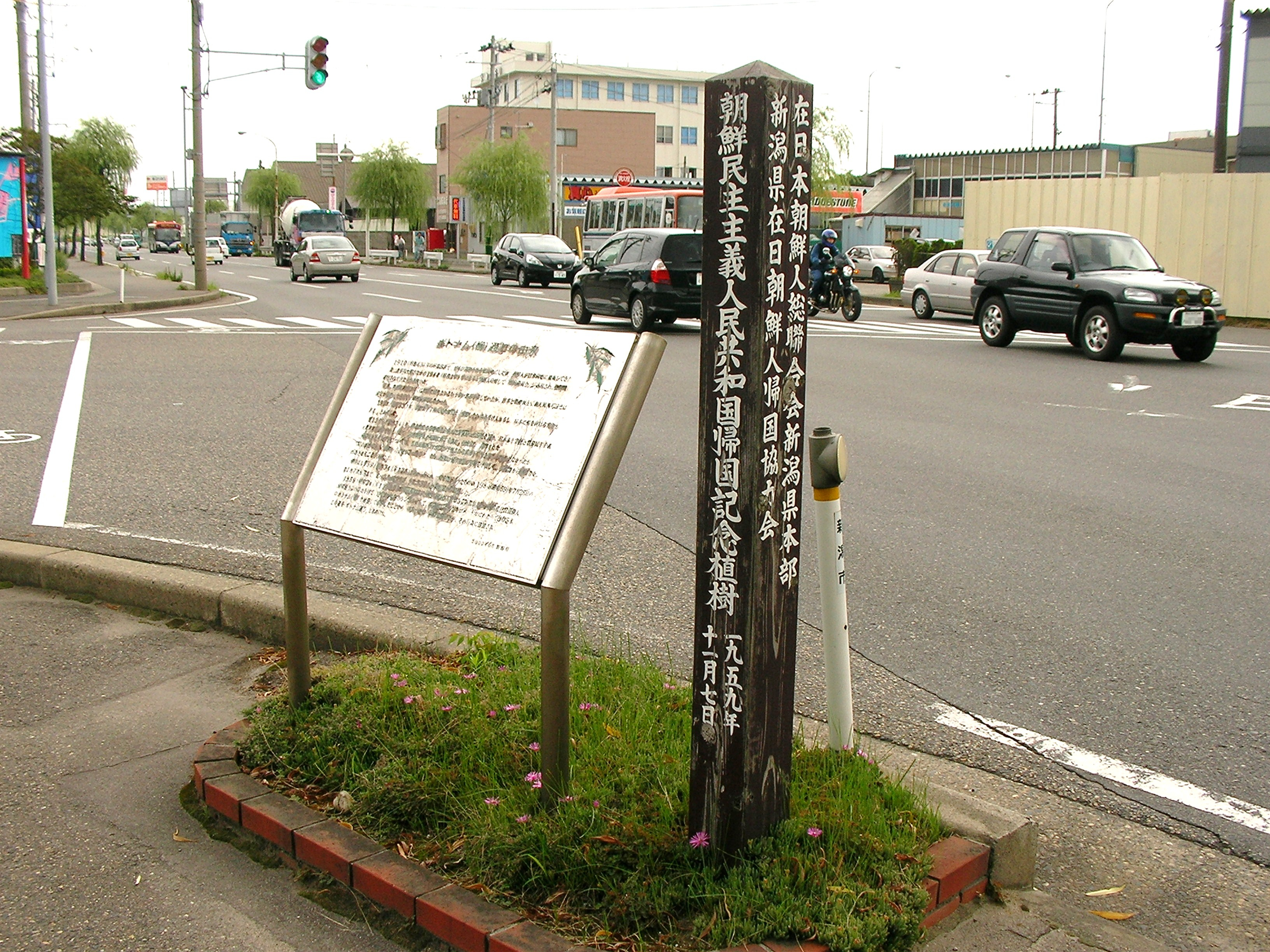 ボトナム通り竜ヶ島歩道橋脇（新潟市中央区）の「朝鮮民主主義人民共和国帰国記念植樹」記念碑。レタッチ済み。ナンバープレートにマスク済み。